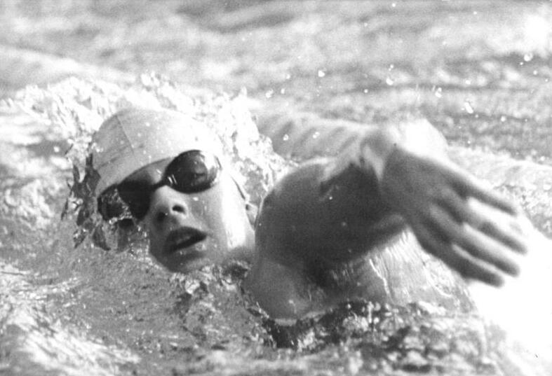 Kristin Otto ADN-ZB Kluge 24.5.84-min- Magdeburg: 35. DDR-Schwimm-Meisterschaften- Weltrekord durch Kristin Otto- Über 200 m Freistil stellte Kristin Otto am zweiten Tag der titelkämpfe (23.3.) mit 1:57,76 einen neuen Weltrekord auf. Die Leipziger DHfK-Schwimmerin blieb damit um 0,58 s unter der alten Rekordmarke der Amerikanerin Woodhead. Abgebildete Personen: Otto, Kristin: Schwimmerin, Olympiateilnehmerin 1988, DDR